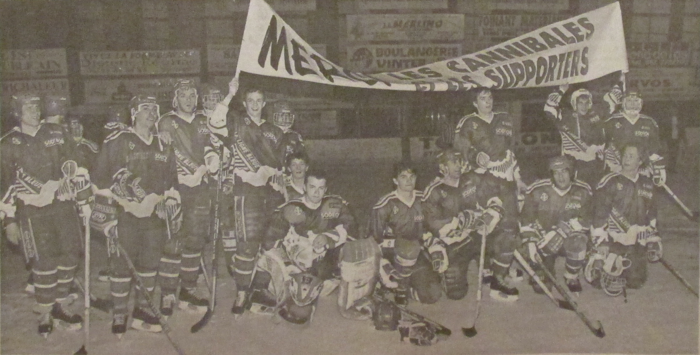 Les joueurs de hockey sur glace spinaliens remercient leurs supporters à la fin de la saison 1992-1993